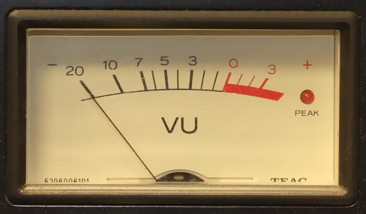 A VU type audio level meter